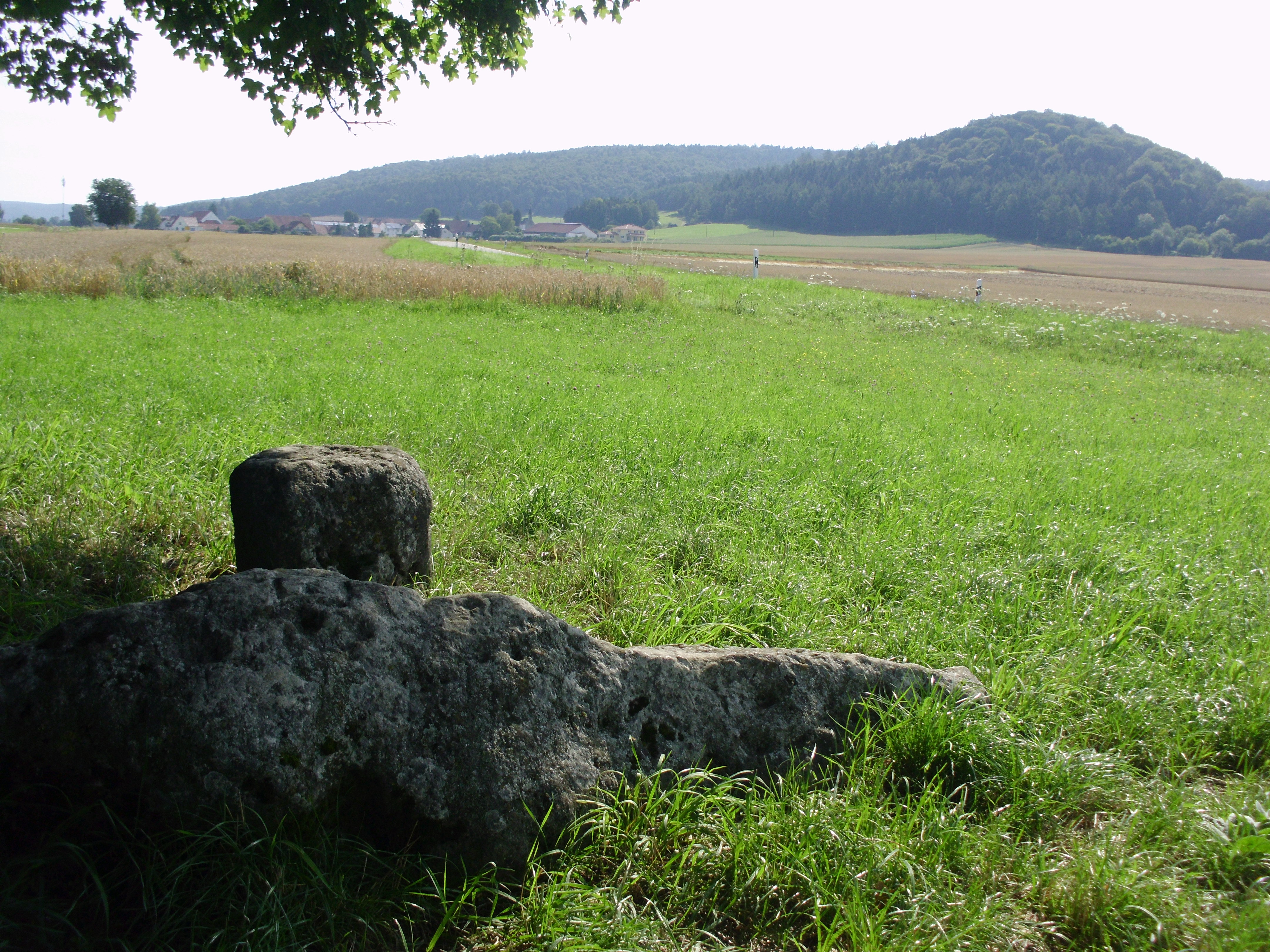 Ellenbrunn (Markt Rennertshofen) im Landkreis Neuburg-Schrobenhausen, Naturdenkmal "Steinerer Mann", Ellenbrunn im Hintergrund